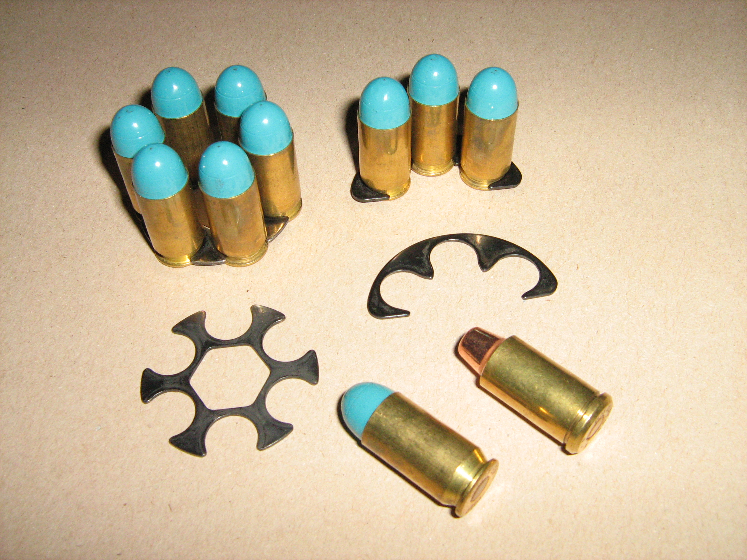 Moon clips (Revolvermunition). Links: full moon clip; rechts: half moon clips; vorn: Patronen Kal. .45ACP und .45 Auto Rim im Vergleich